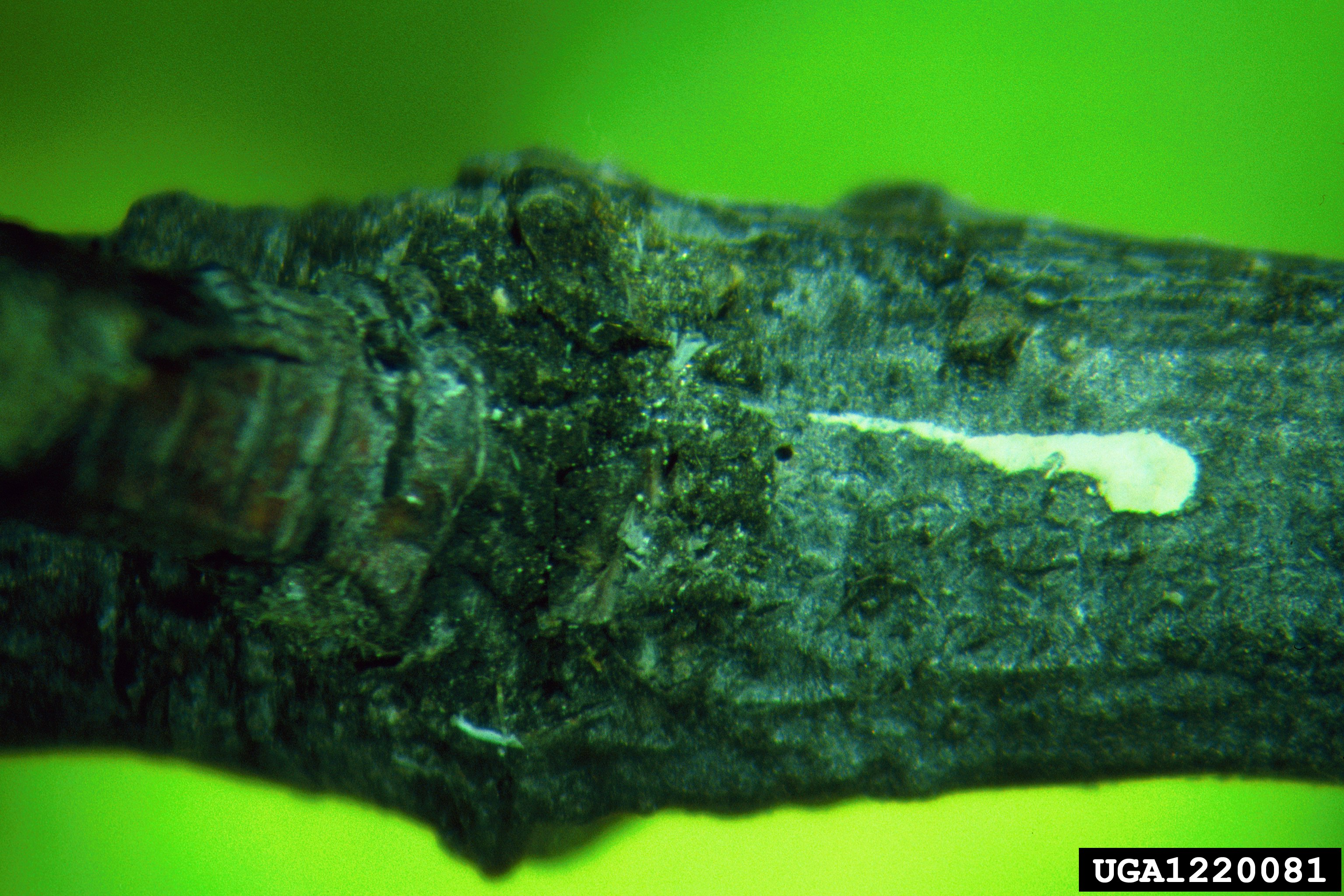 Tortrix viridana